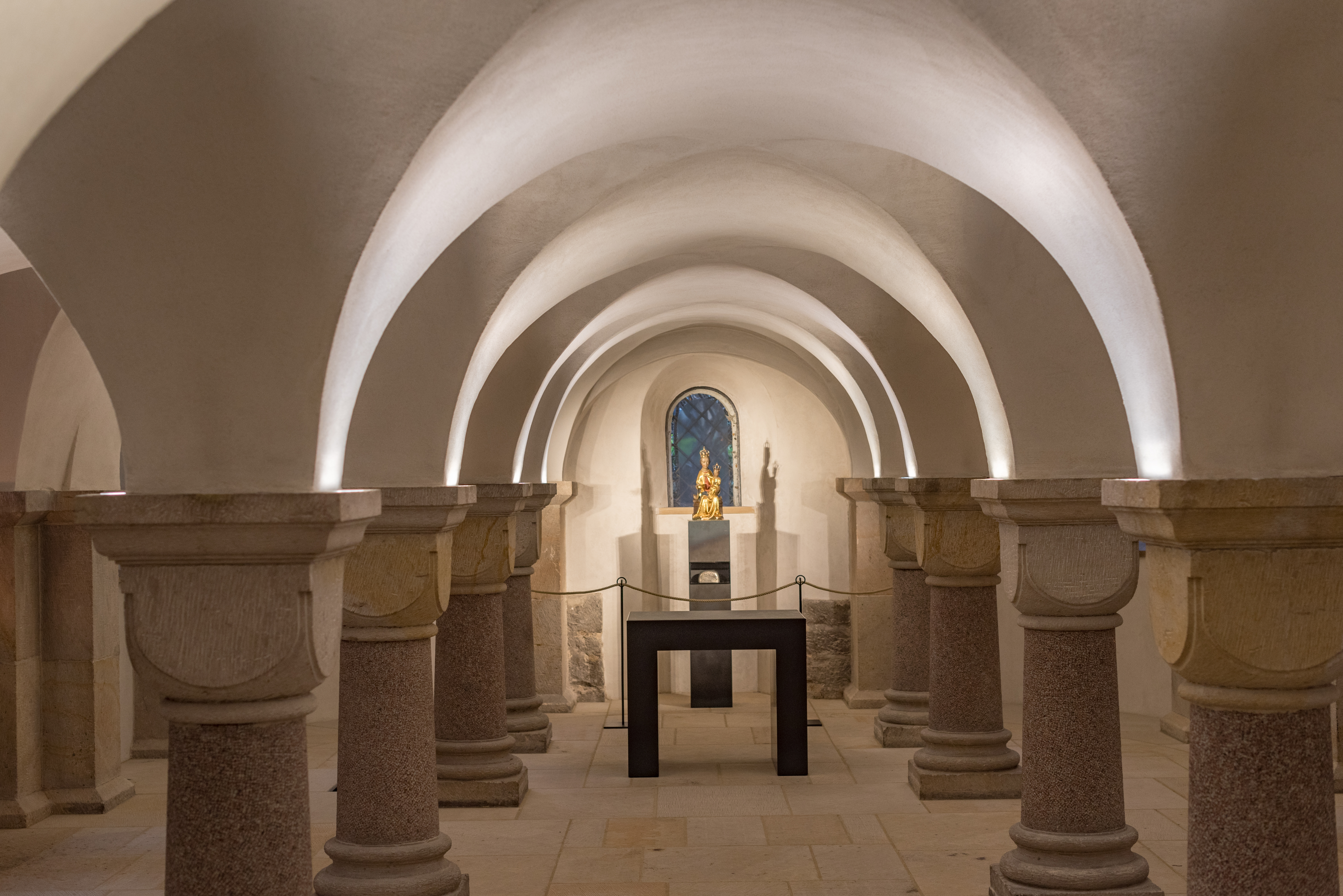 Hildesheim, Domhof, Dom, Krypta